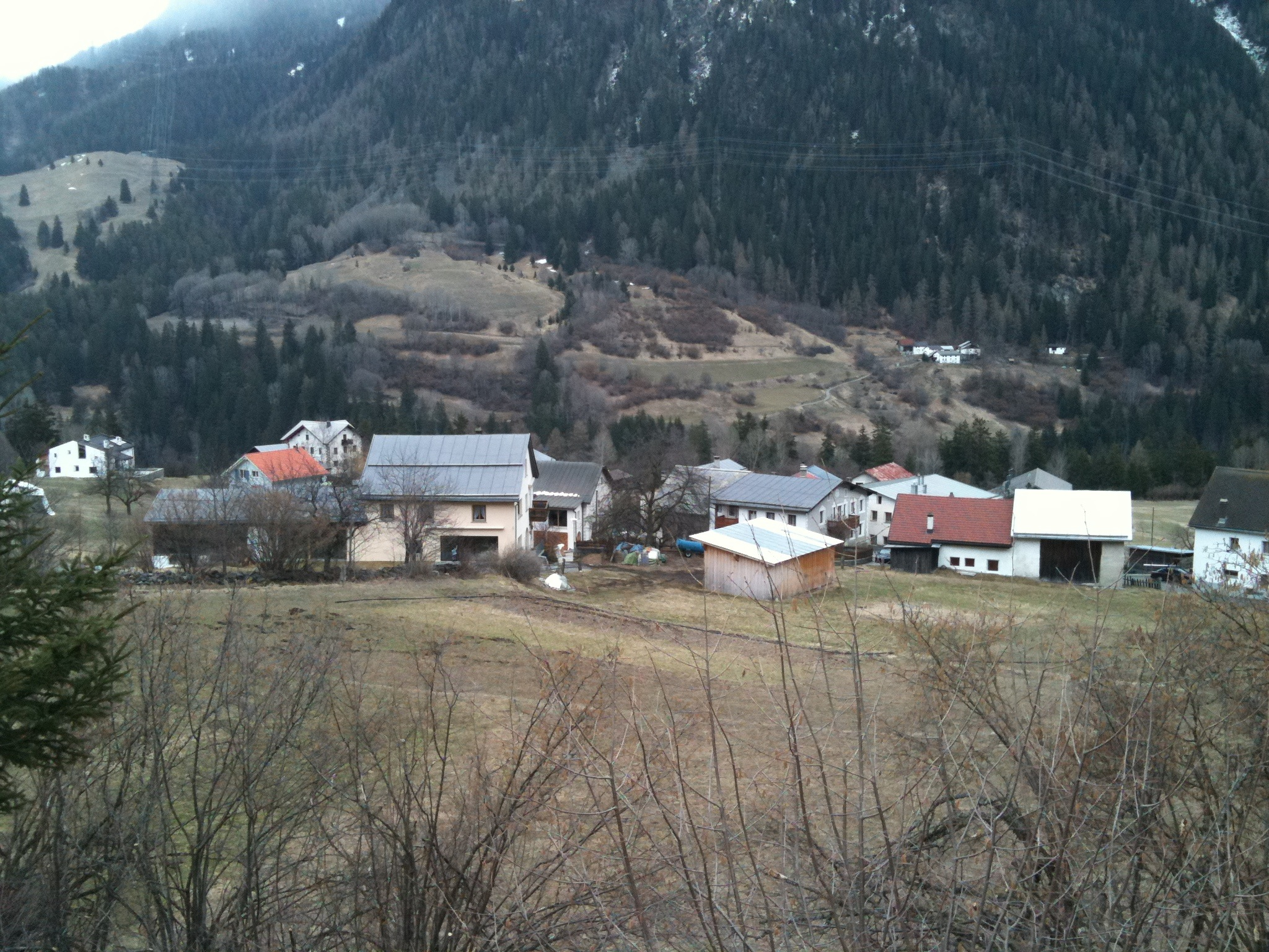 Seraplana, Ort im Unterengadin (Kanton Graubünden)